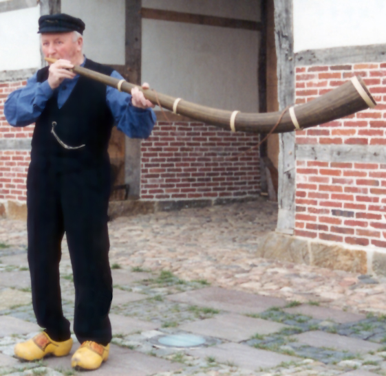 Middewinterhornbläser in traditioneller Kleidung in der Grafschaft Bentheim, Autor: Wilhelm Snippe